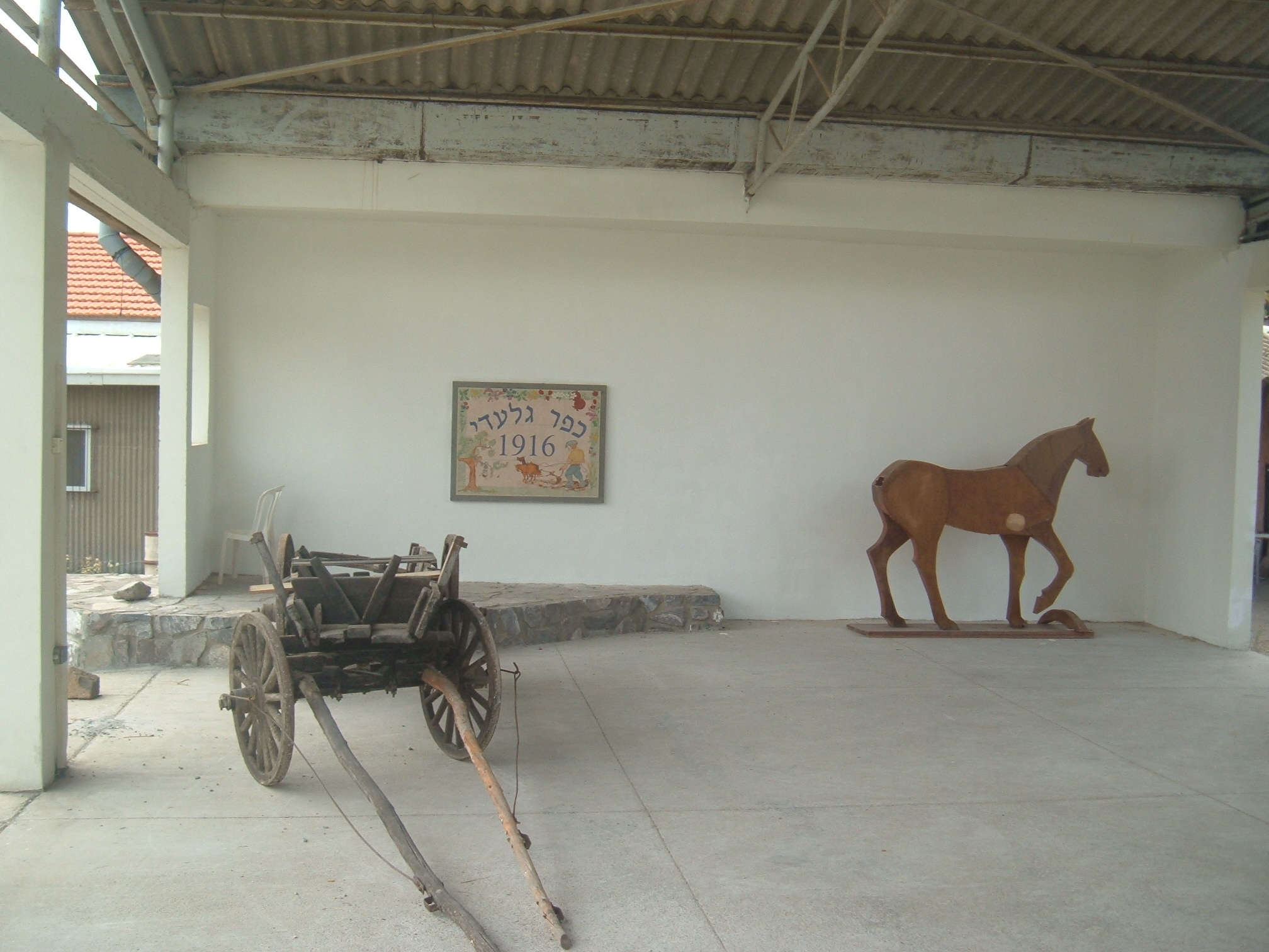 Pioneer's court in Kefar Giladi, Israel. חצר הראשונים בכפר גלעדי